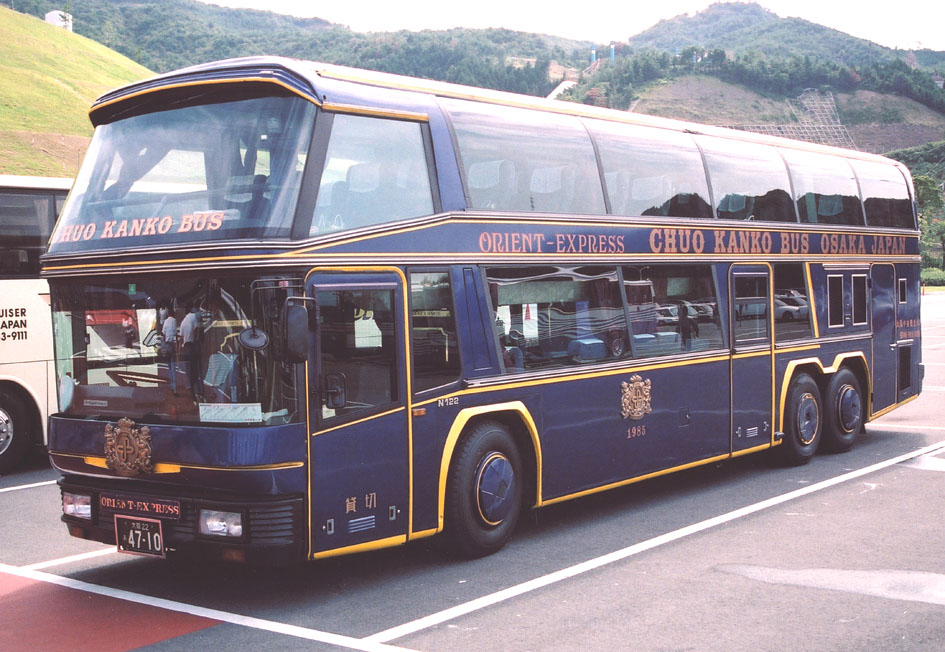 大阪中央観光 ネオプラン スカイライナー N122 ORIENT-EXPRESS.